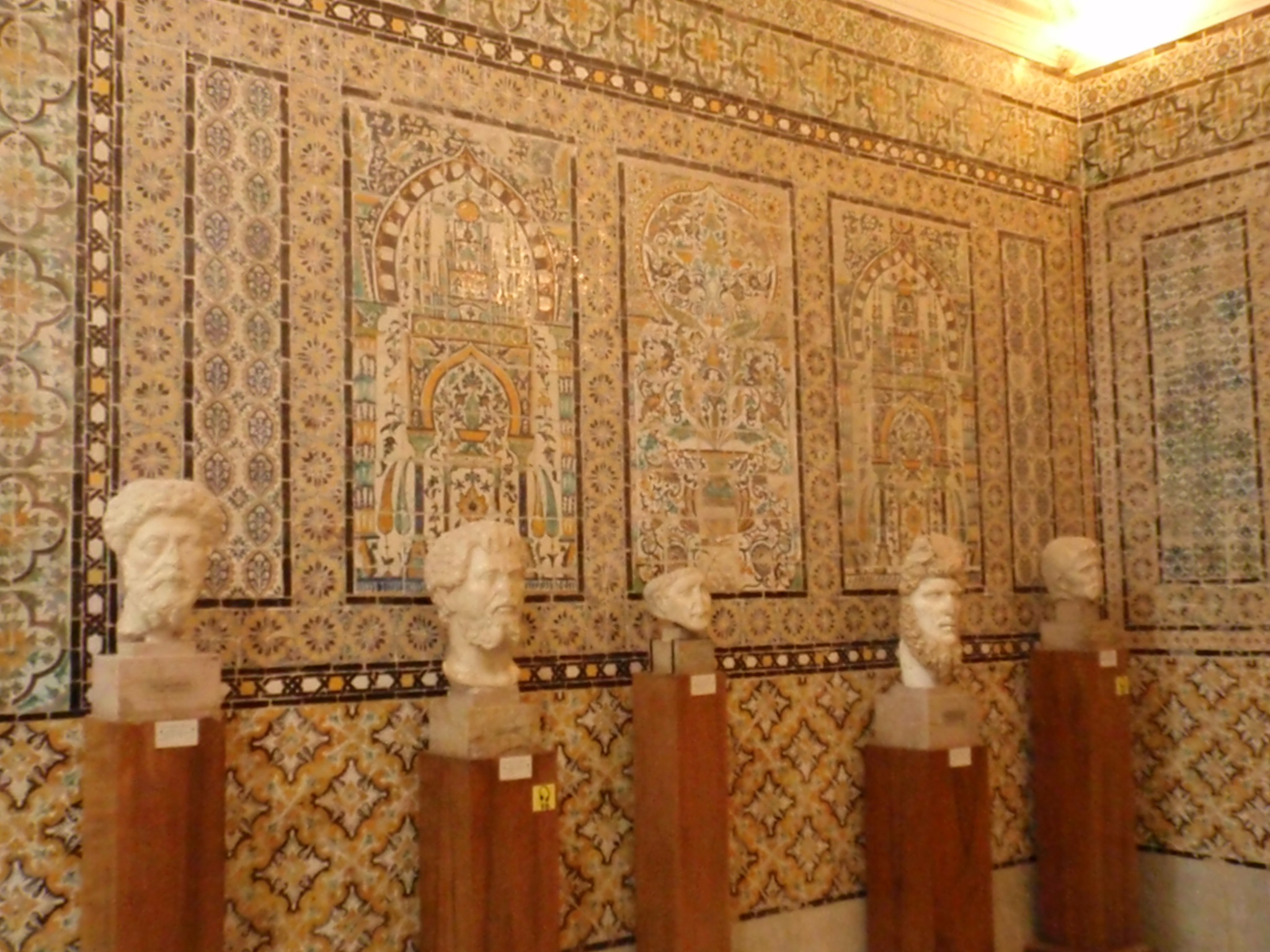 bustes d'empereurs